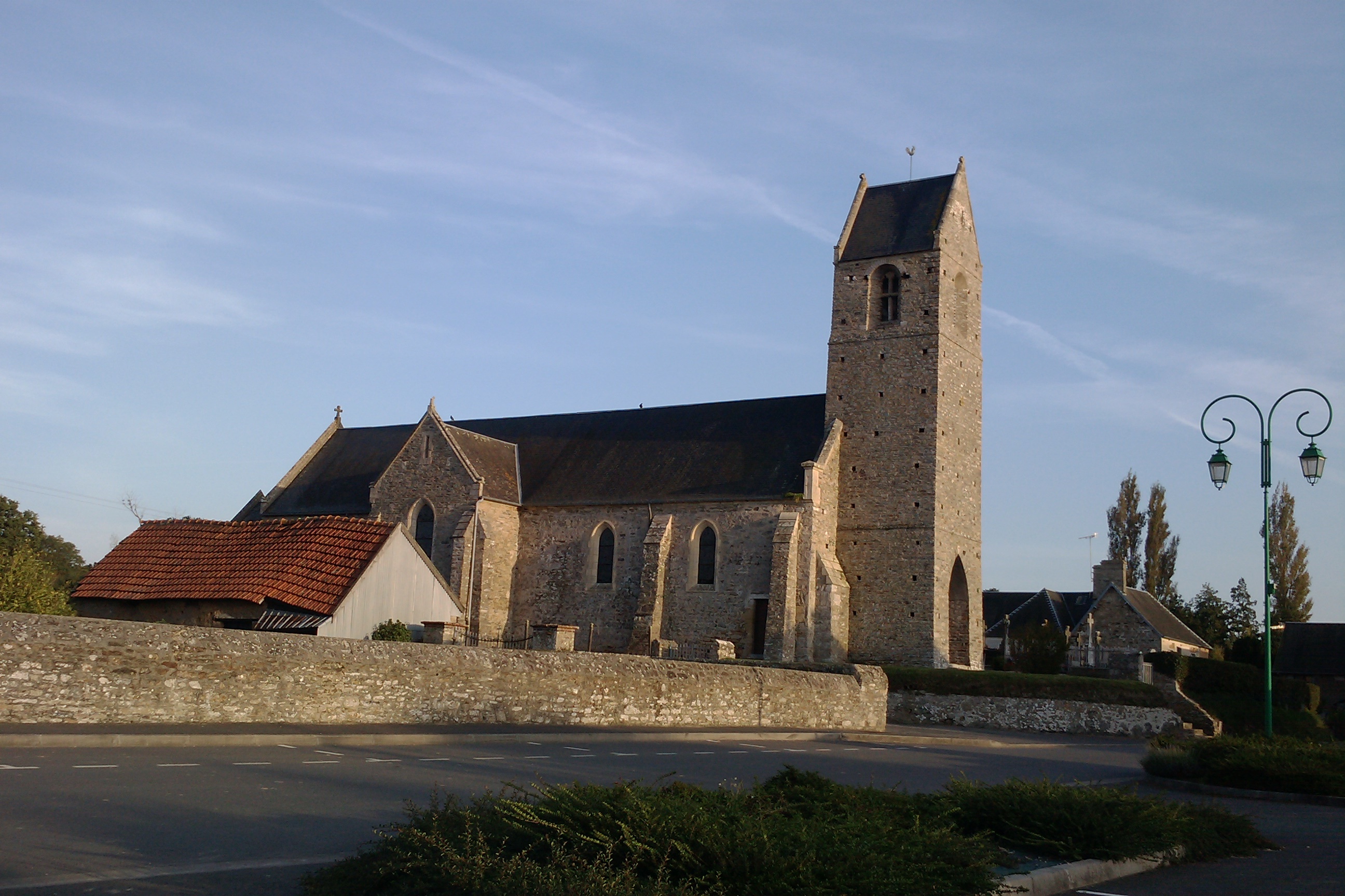 église (14e / 18e s.) de Saint-Sébastien-de-Raids